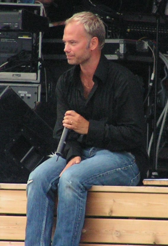 Niklas Hjulström appearing in Trollhättan in 2006